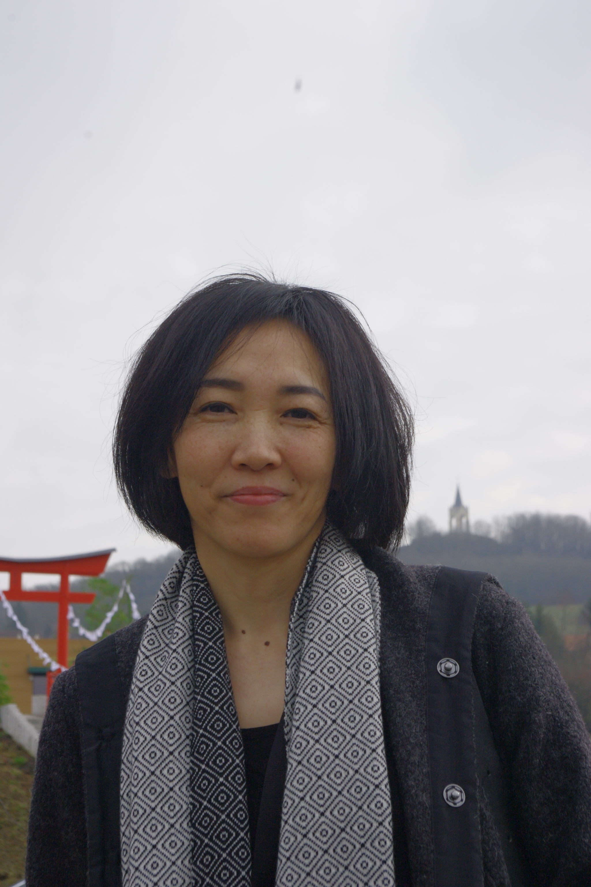 FICA 2017 - Vesoul